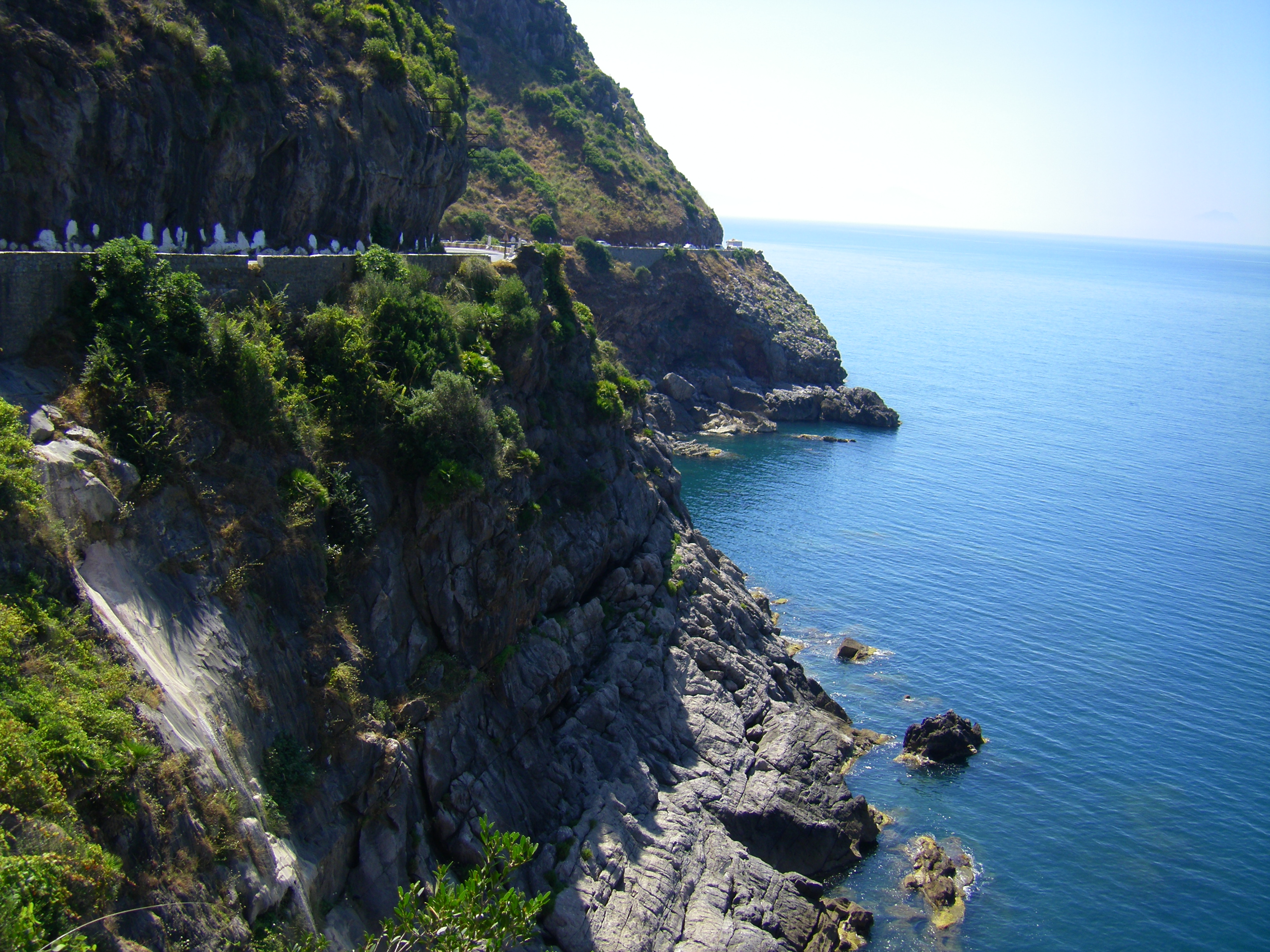 La corniche Djidjilienne à Ziama Mansouriah, Algérie